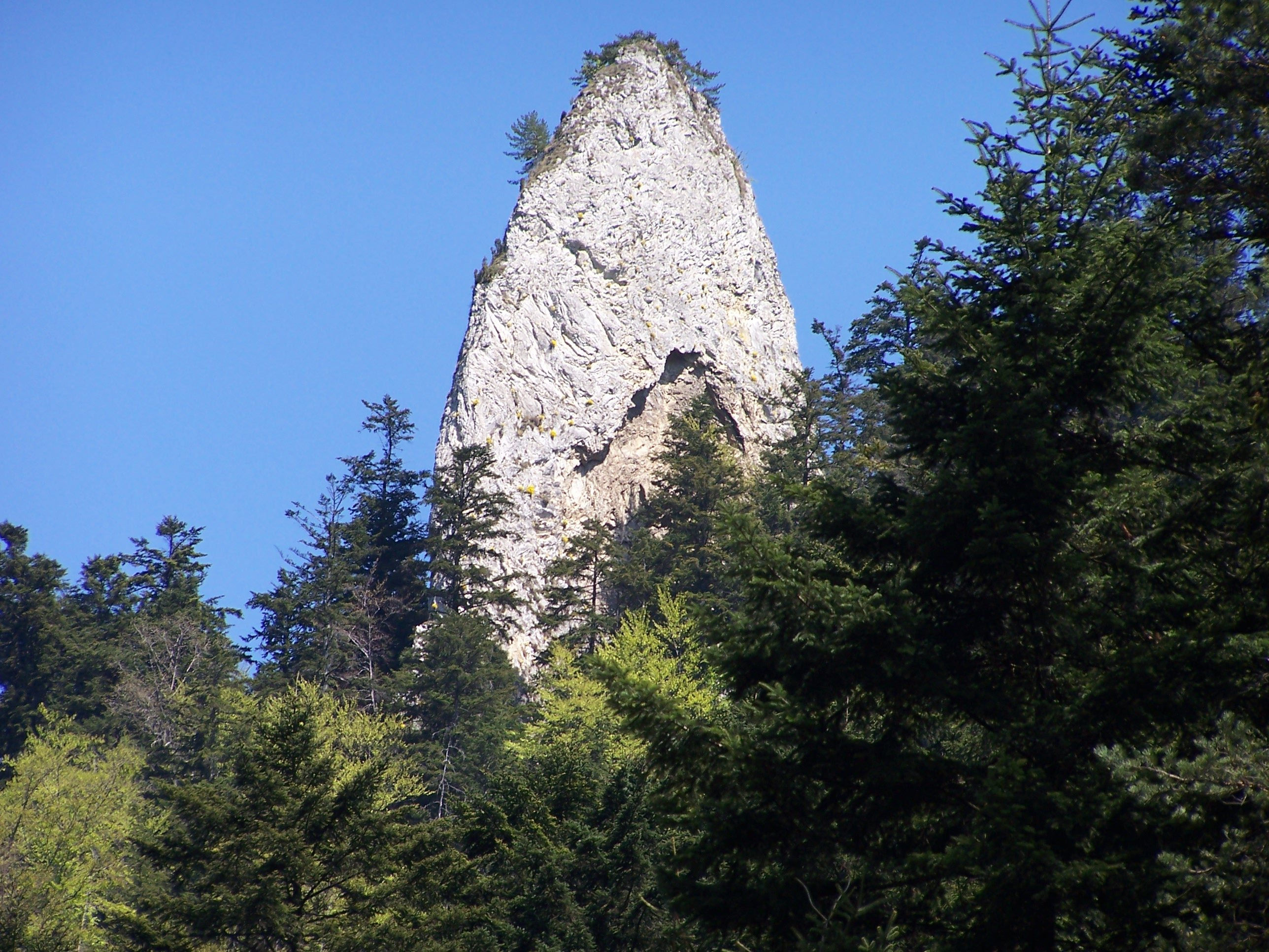 Kopa Siana (Pieniny)